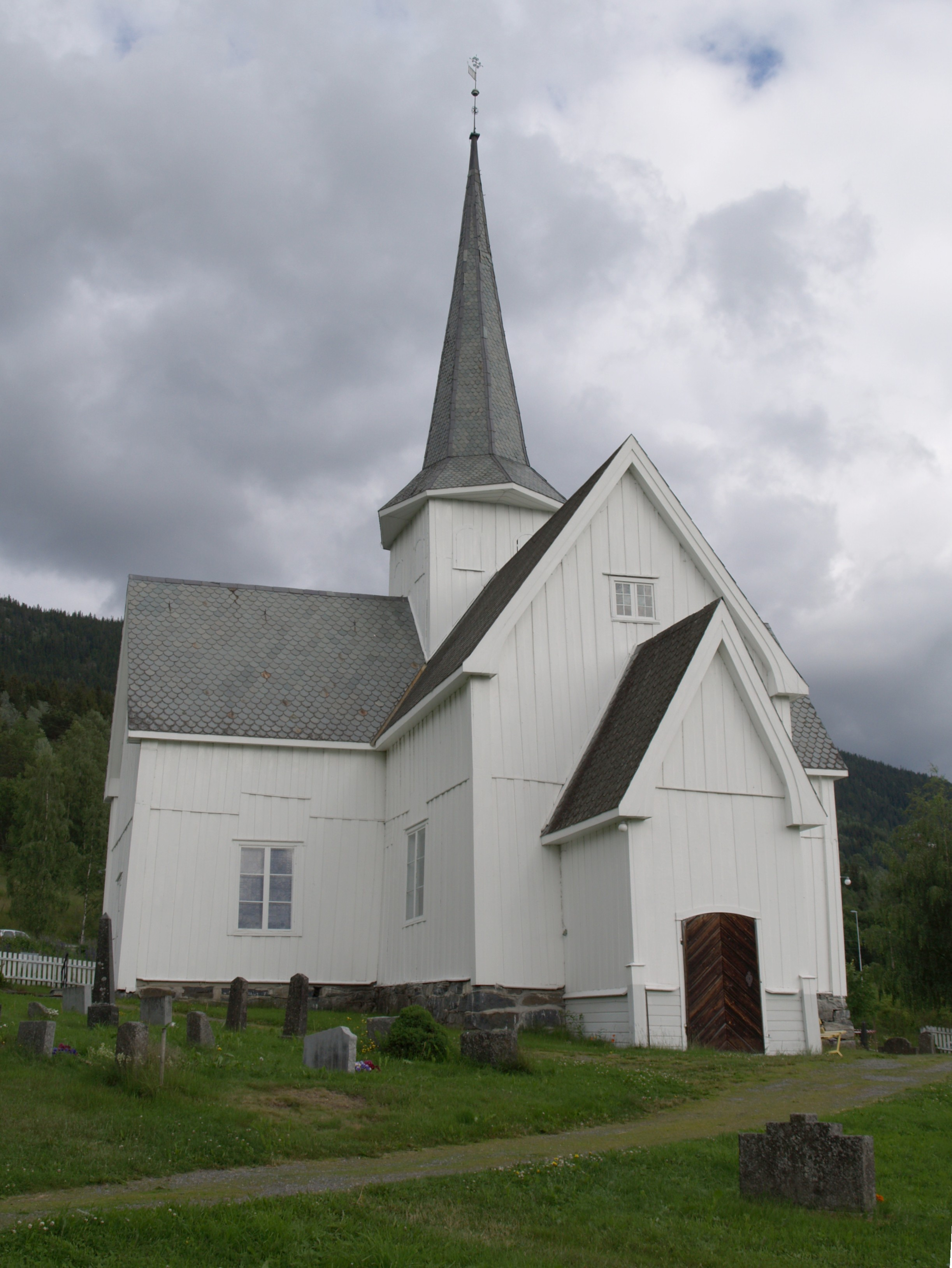 Aurdal church, Nord-Aurdal. See Aurdal kirke.